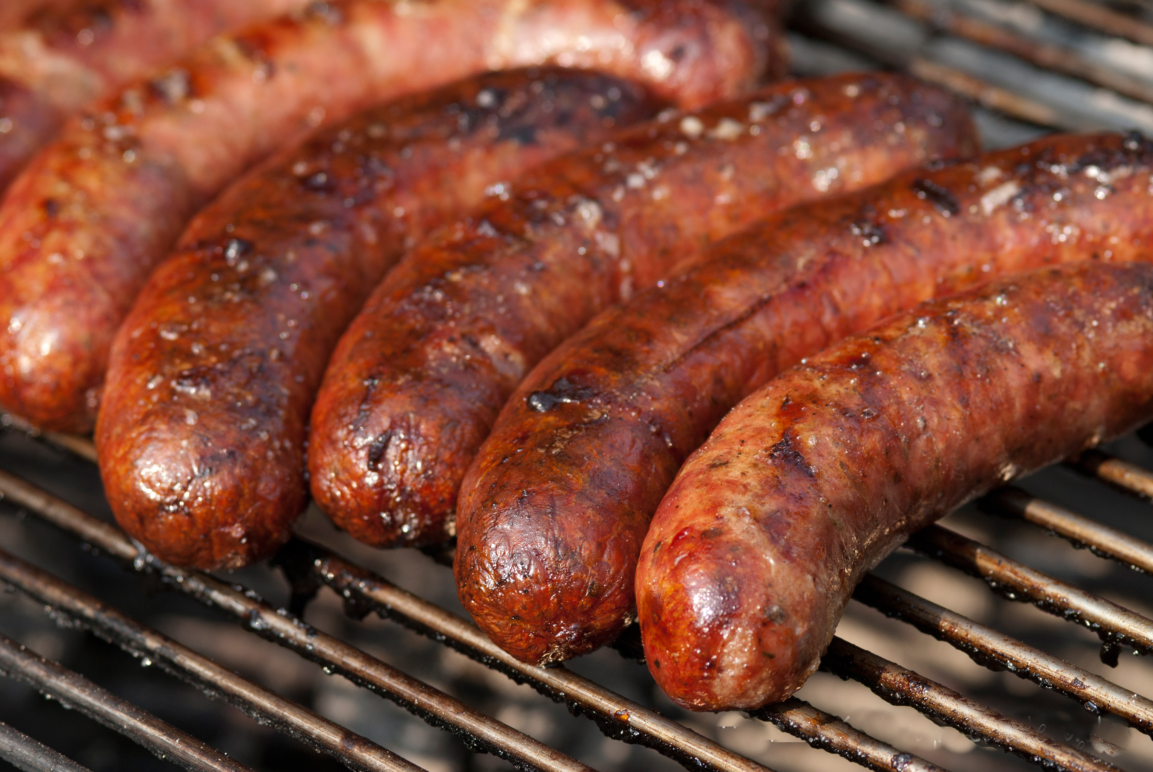 traditionell hergestellte grobe Wildschweinbratwurst auf dem Holzkohlegrill